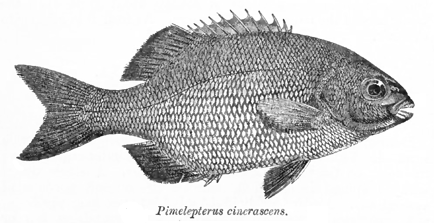 Pimelepterus cinerascens = Kyphosus cinerascens (Forsskål, 1775)